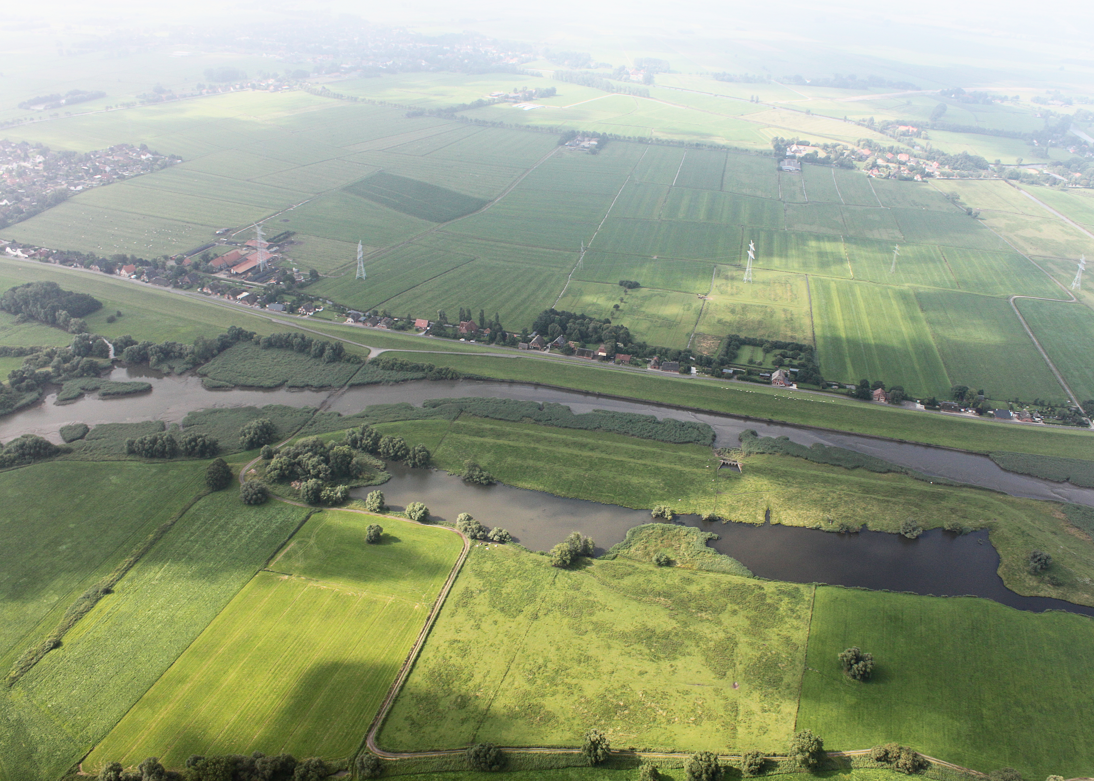 Fotoflug Bremen; Flughöhe 500 m; Luftbilder Bremen-Nord; Flug entlang der Weser von West nach Ost, über dem linken Weserufer